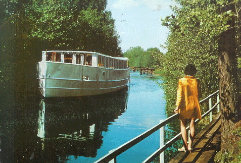 KIND vid Hovetorp, vykort 1960-tal. KIND är före detta sjöångsprutan Phoenix